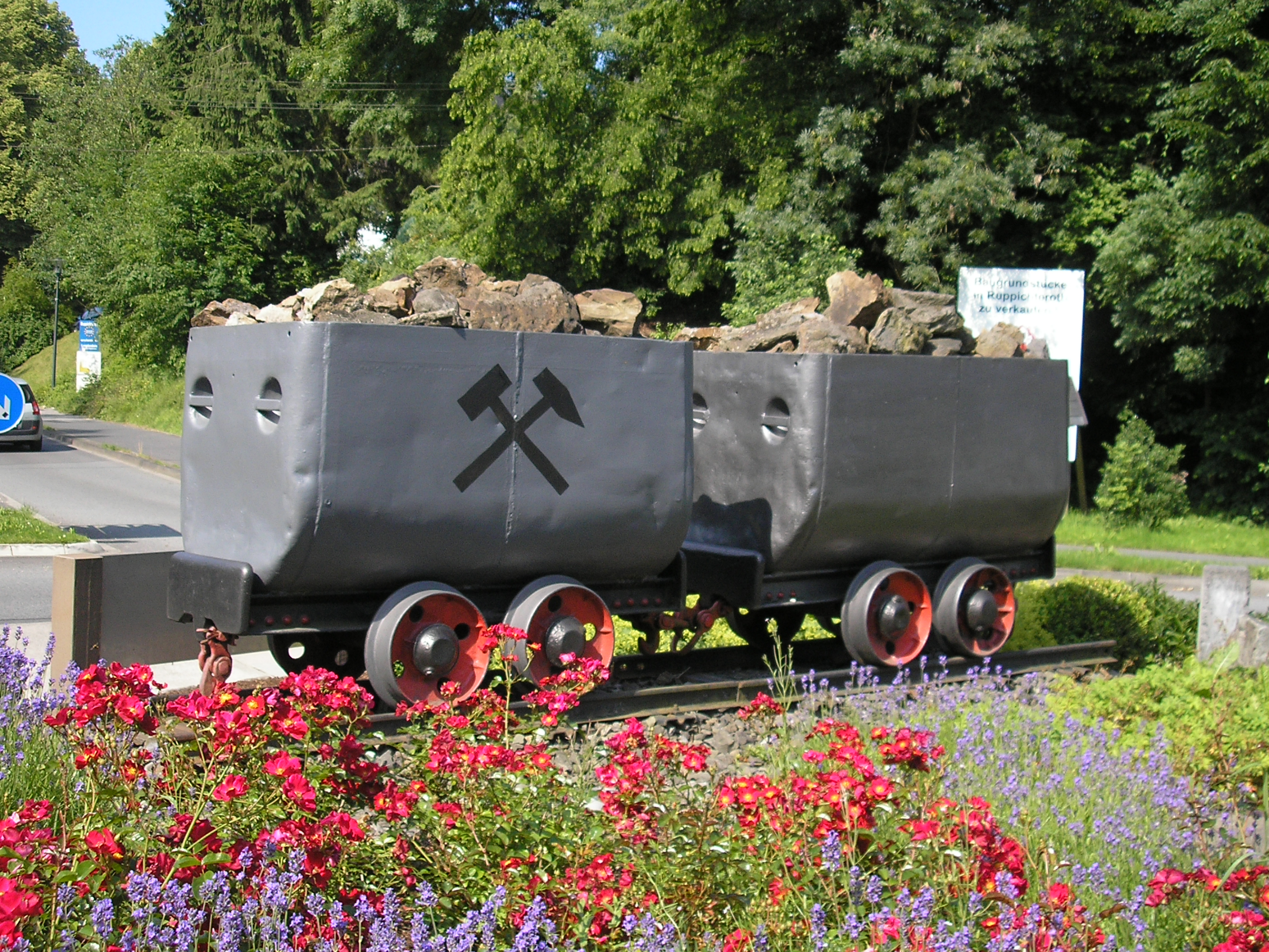 Ruppichteroth, im Kreisverkehr der B 478